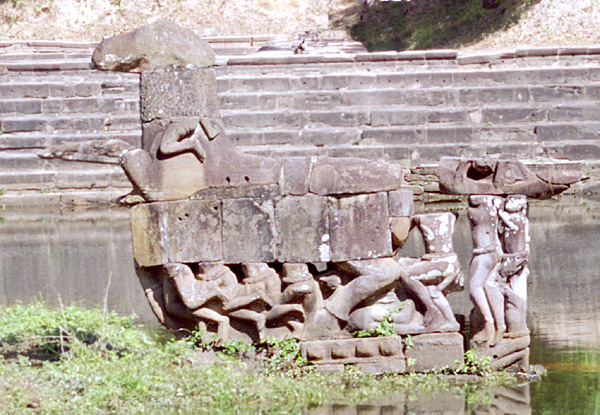 Balaha horse at Neak Pean temple, Angkor, Cambodia